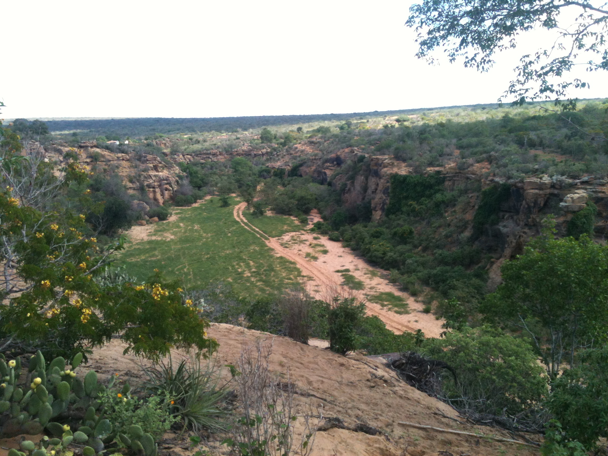 Raso da Catarina BA, Brasil